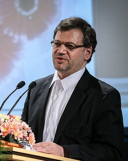 باقر لاریجانی در مراسم تودیع و معارفه رئیس دانشگاه علوم پزشکی تهران (مهر ۱۳۹۲)